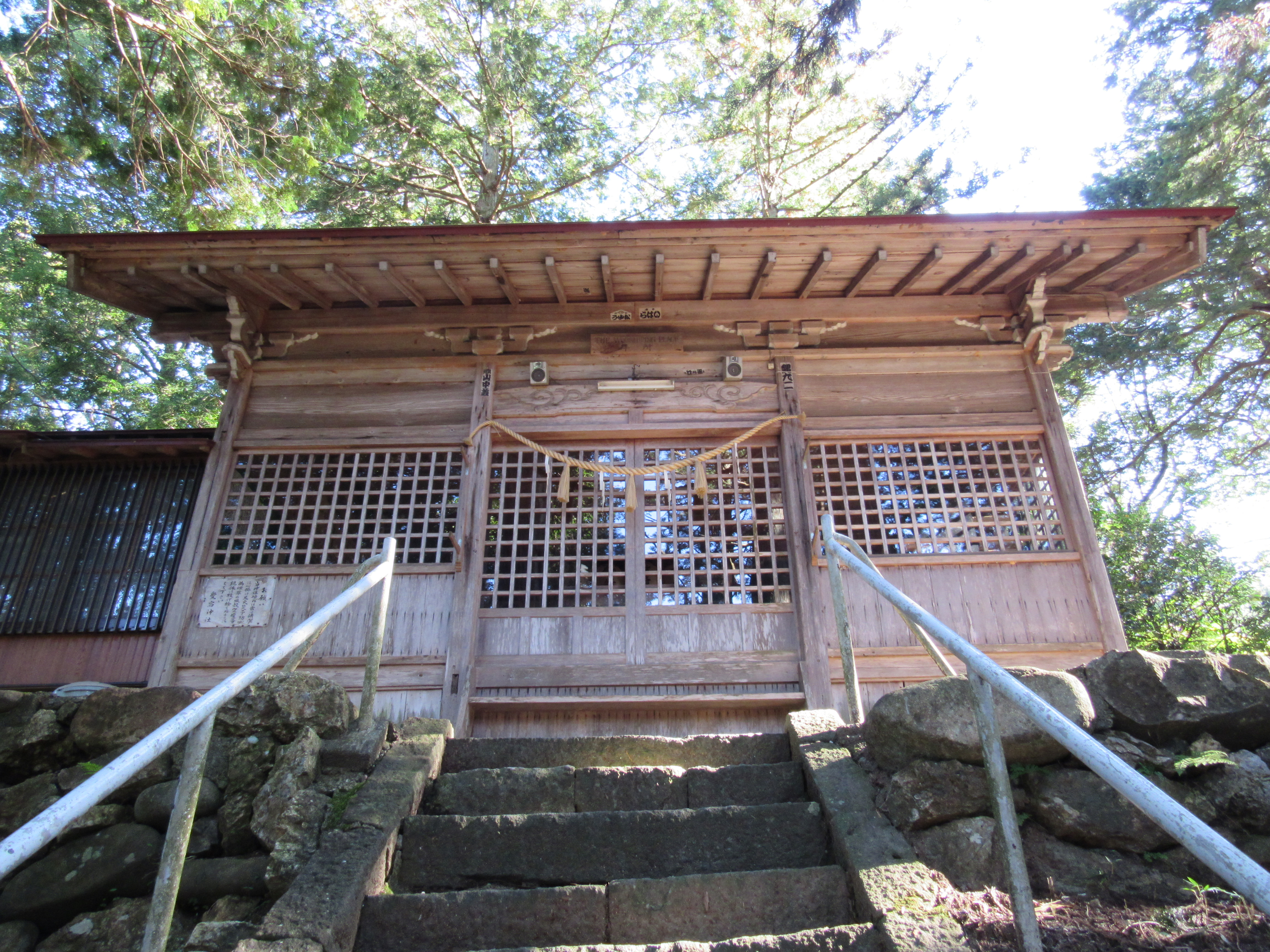 愛宕神社本殿